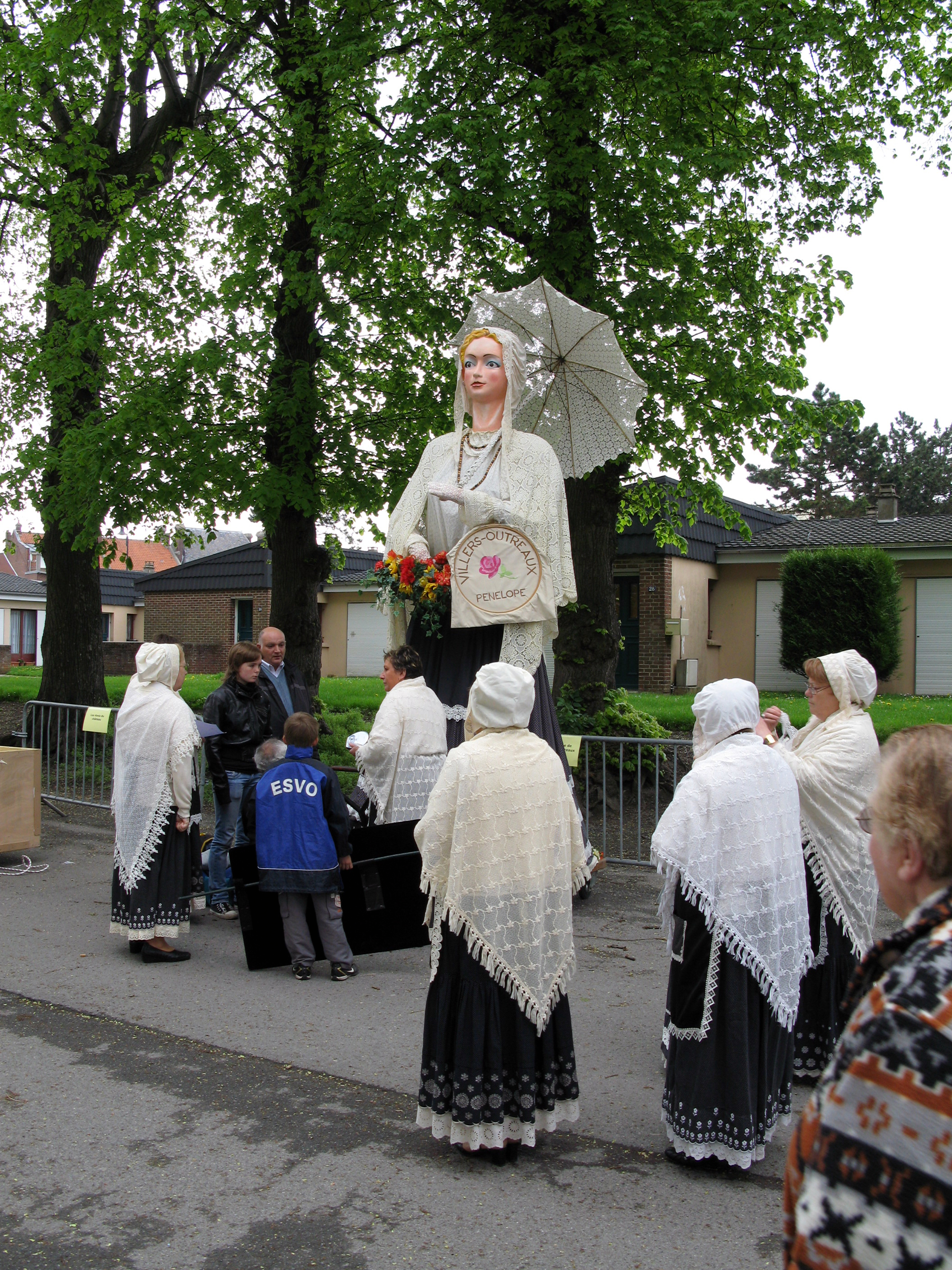 Ham (Somme, France) - Animation festive au centre-ville, un dimanche de printemps. Derrière l'Office de Tourisme (non loin des vestiges du Château). Avant la parade, vers 14 heures, les géants de procession sont assemblés et costumés. On voit ici « Pénélope » et quelques-uns de ses accompagnateurs.